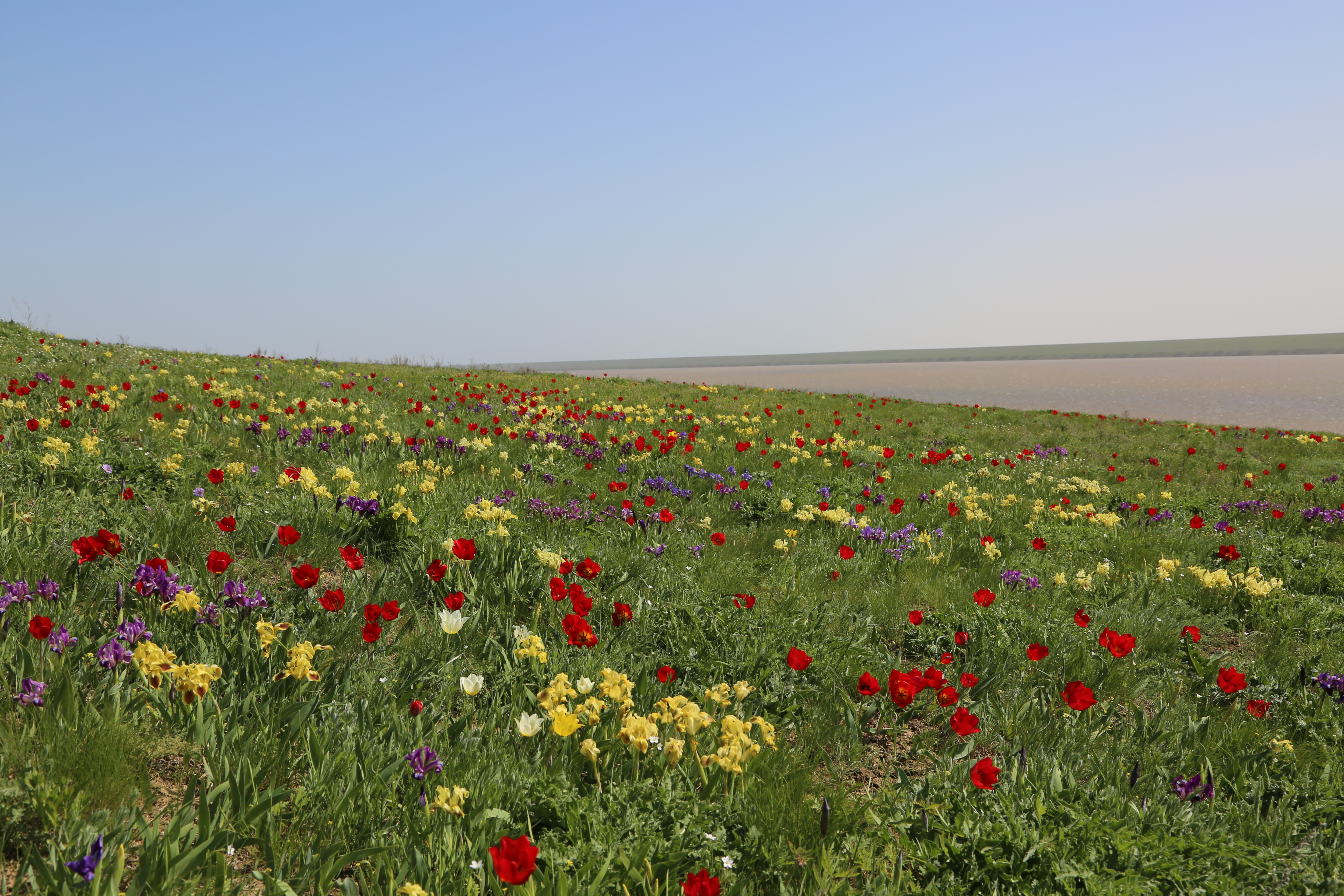 Ростовский заповедник: в центральной части Кума-Манычской впадины, к северу от оз. Маныч-Гудило, в Орловском и Ремонтнеском районах Ростовской области,Орловский район, Ростовская область This image is related to the protected area of Russia number 6100108